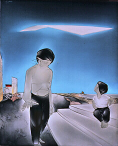 L'Adolescent et l'Enfant - 100x81 cm, 1963